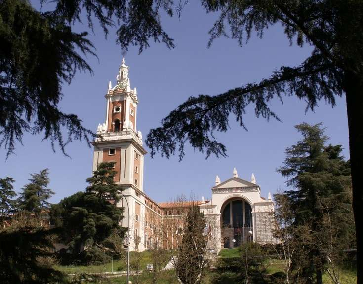 Museo de América, Madrid, España.